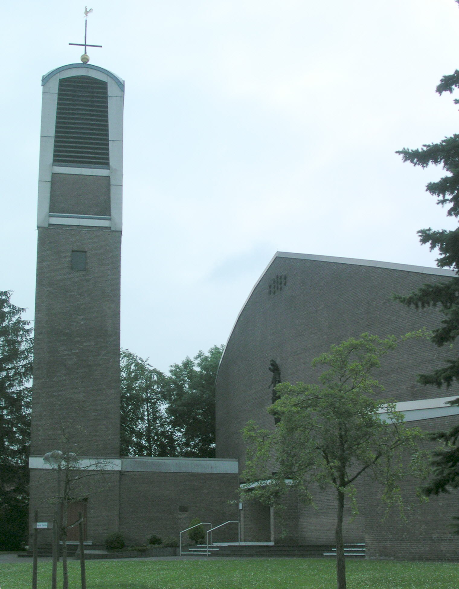 Aachen-Eilendorf, katholische Apolloniakirche